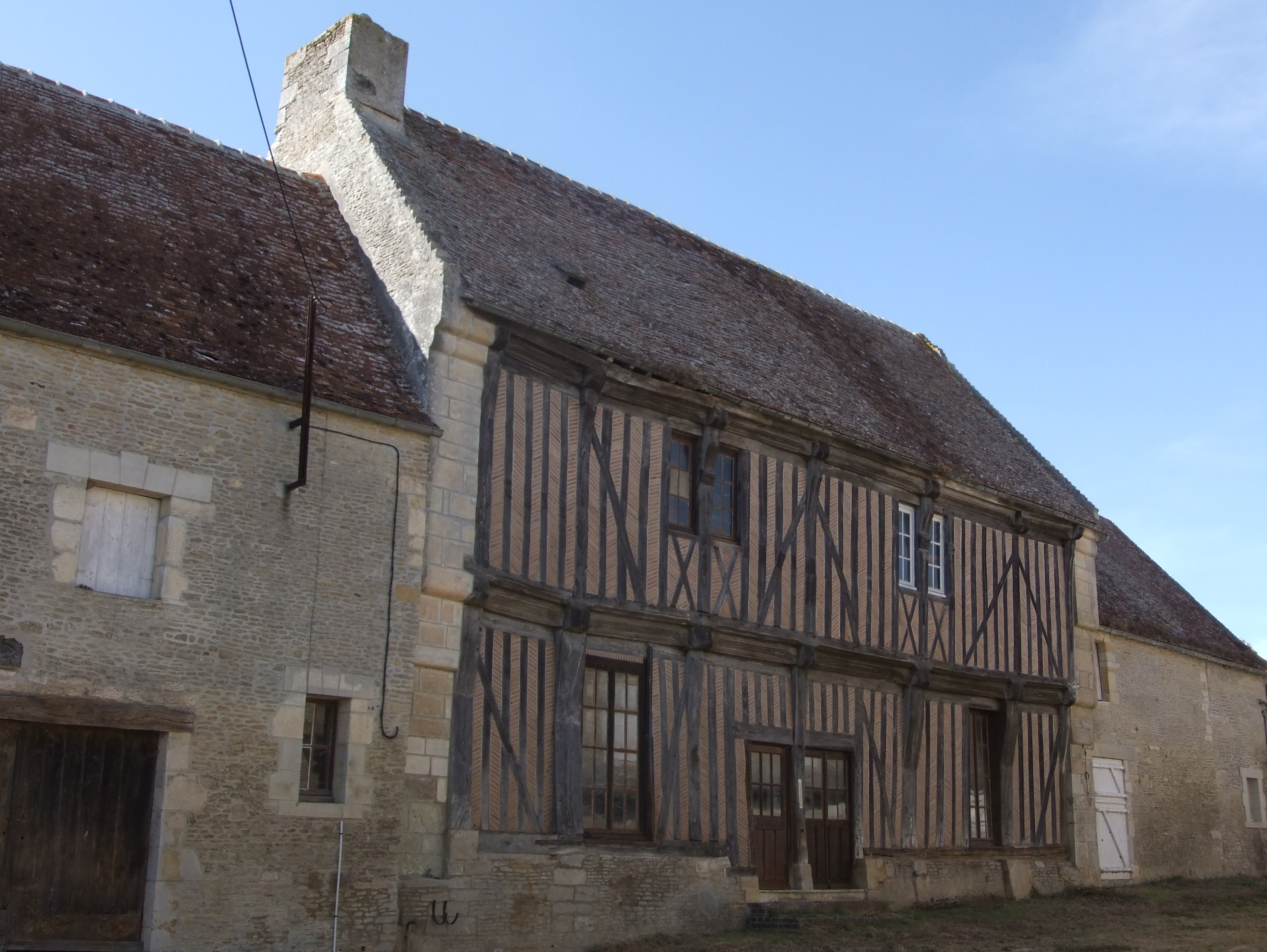 Maison La Taverne, à Barou-en-Auge (Calvados, France) .